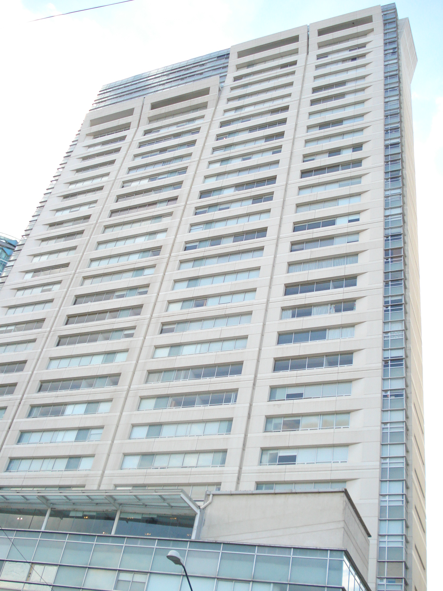 Edificio H2O Condominios, es el cuarto edificio más alto del centro financiero Santa Fe ubicado en la Ciudad de México